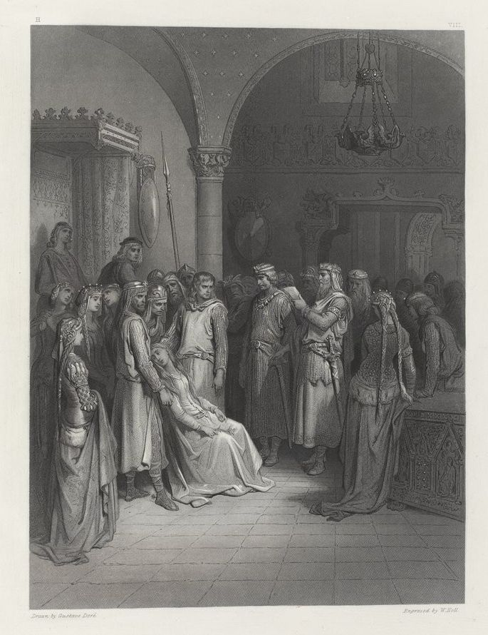 Il lut ainsi, et toujours pendant cette lecture seigneurs et dames pleuraient promenant leurs regards de la figure du roi à celle qui reposait silencieuse.